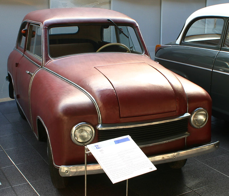 Lloyd LP300